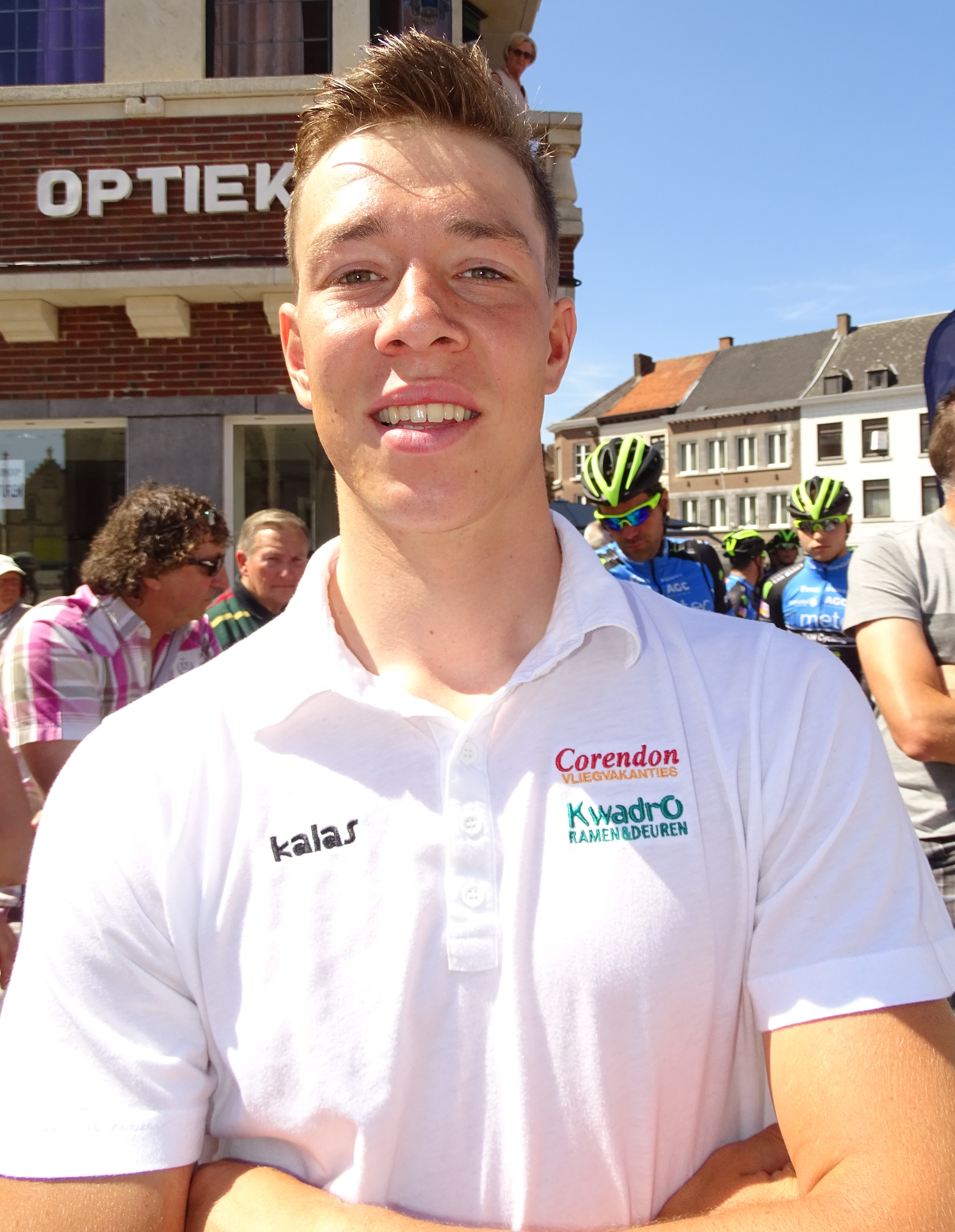 Reportage réalisé le dimanche 14 juin à l'occasion du départ et de l'arrivée du Tour du Limbourg 2015 à Tongres, Belgique.